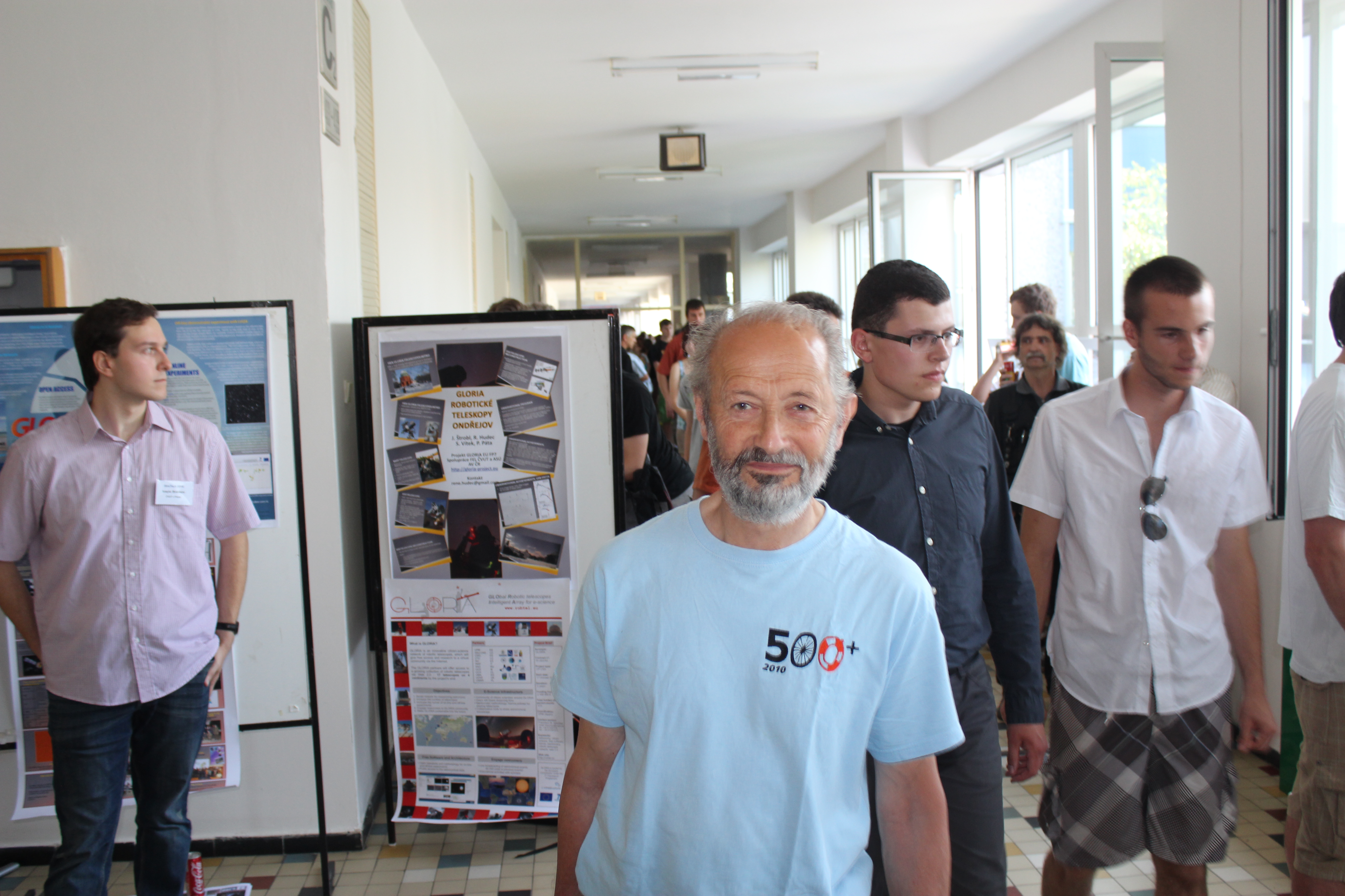 RNDr. Jan Maňák – fotograf na chráněném pracovním místě. Atelier Svatopluk, o.p.s. prezentuje Naučnou stezku Liteň na národním workshopu Stedoškolkská Technika